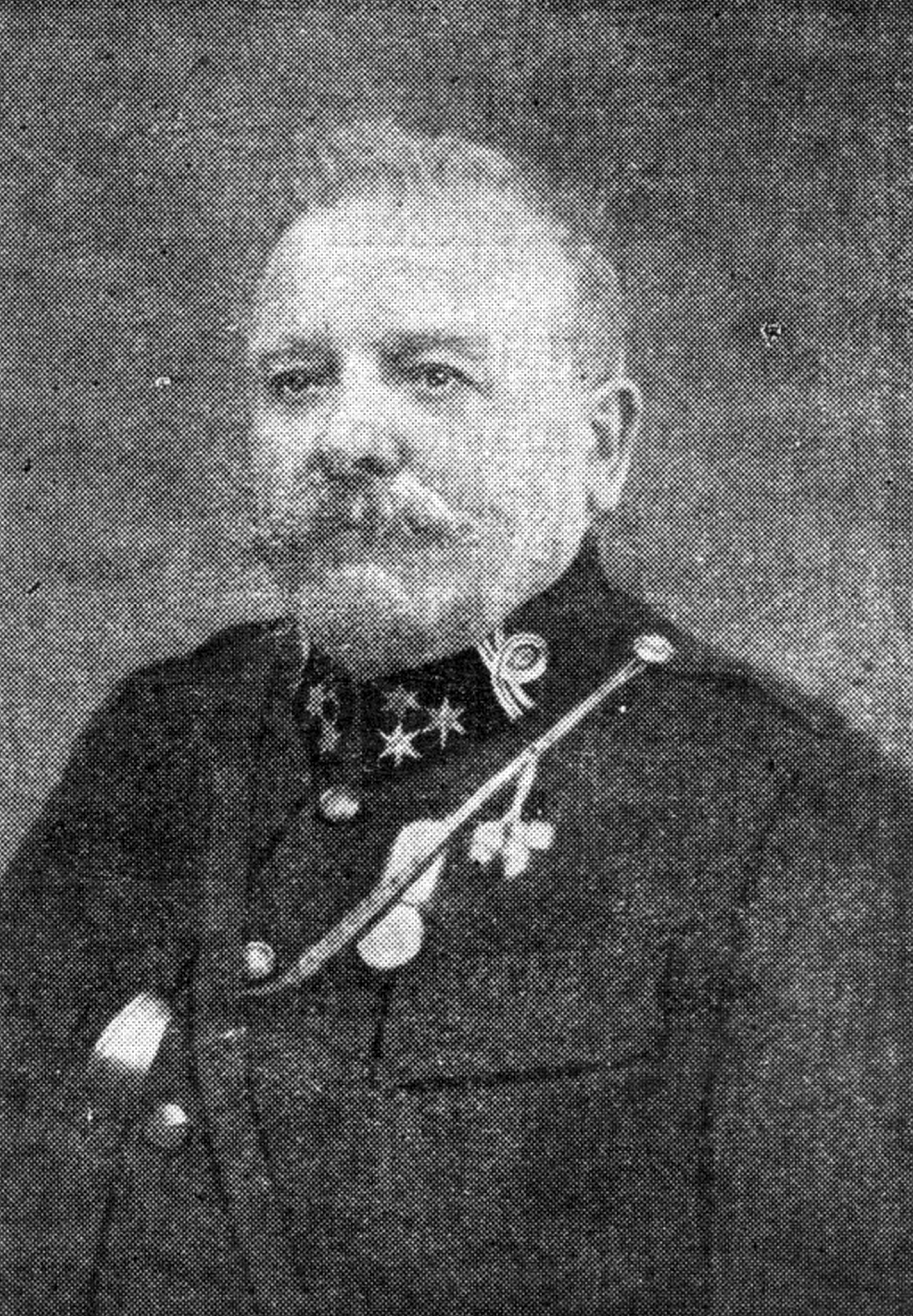 Jan Stryczek (ur. w 1868, zm. w 1936) – naczelnik Ochotniczej Straży Pożarnej w Dziedzicach, teść Stanisława Krzyżowskiego